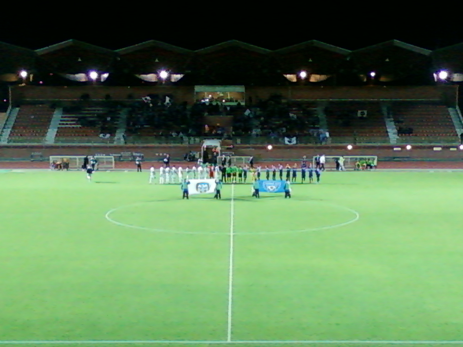 Présentation des équipes lors du match de Ligue 2 SC Bastia - Arles-Avignon du 28 octobre 2011 au stade Dominique-Duvauchelle de Créteil